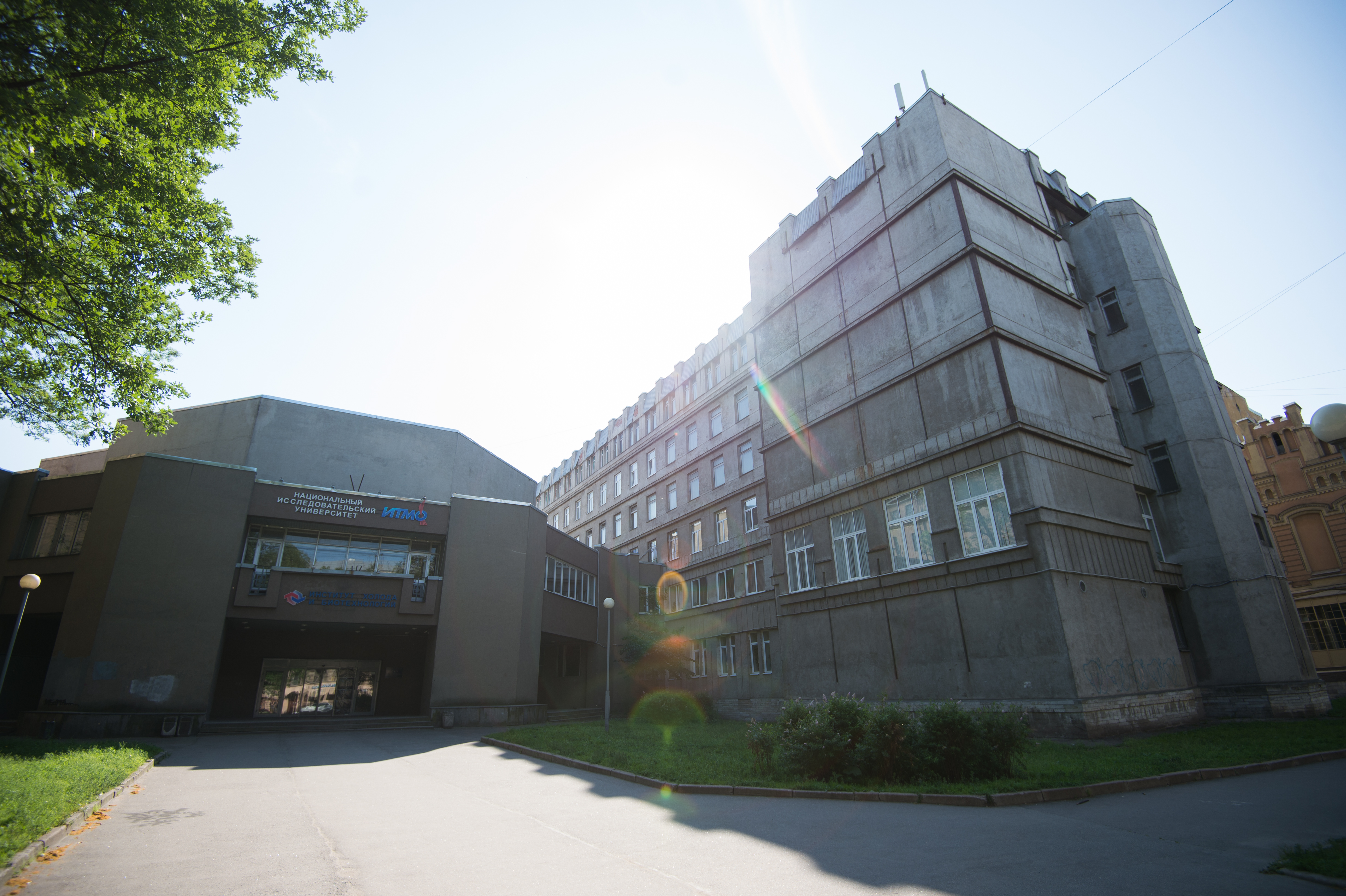 Учебный корпус Университета ИТМО на Кронверкским проспекте